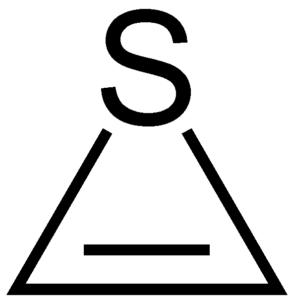 Struktur von Thiiren